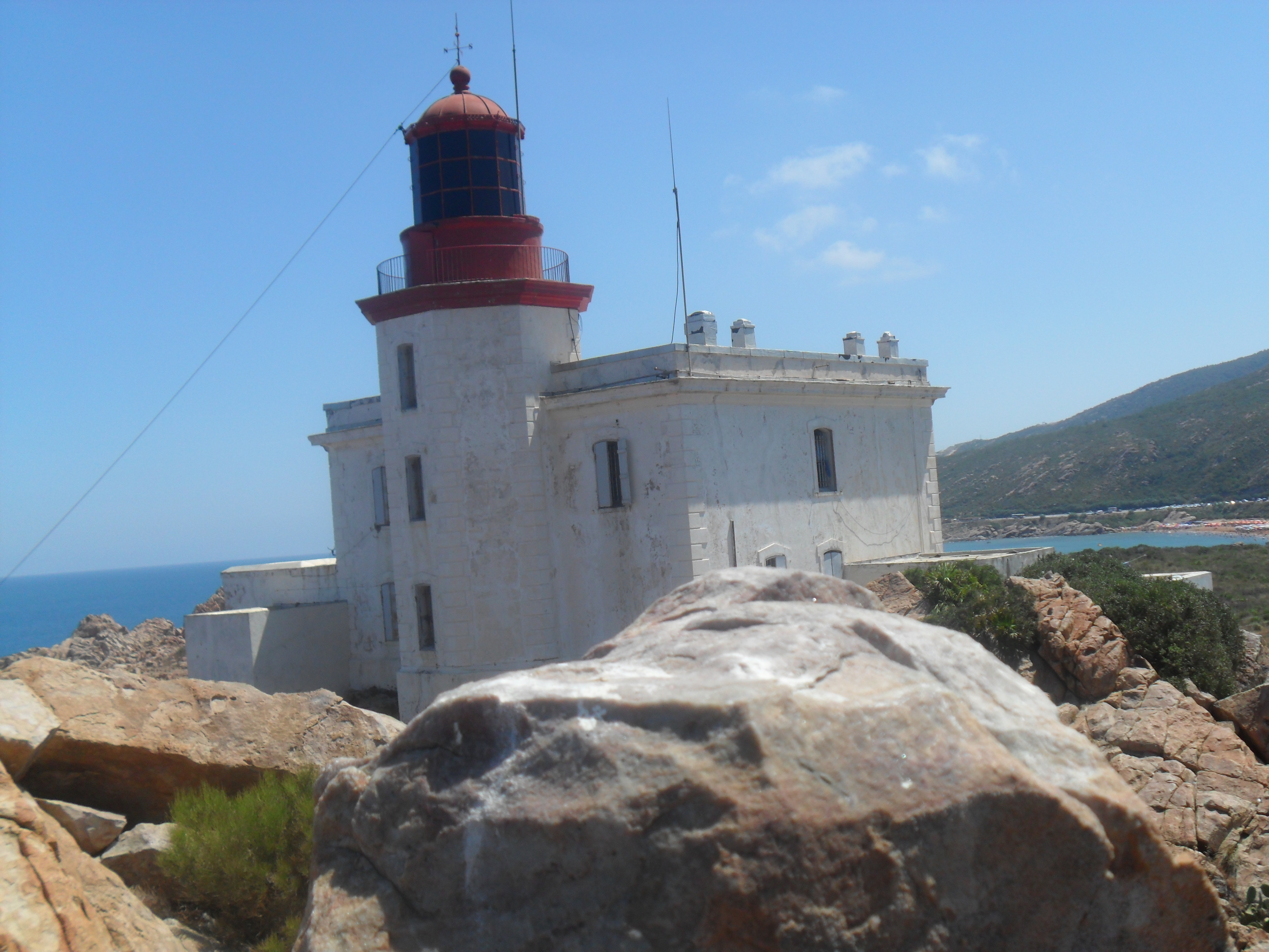 Le Grande Phare, Jijel (Algérie)